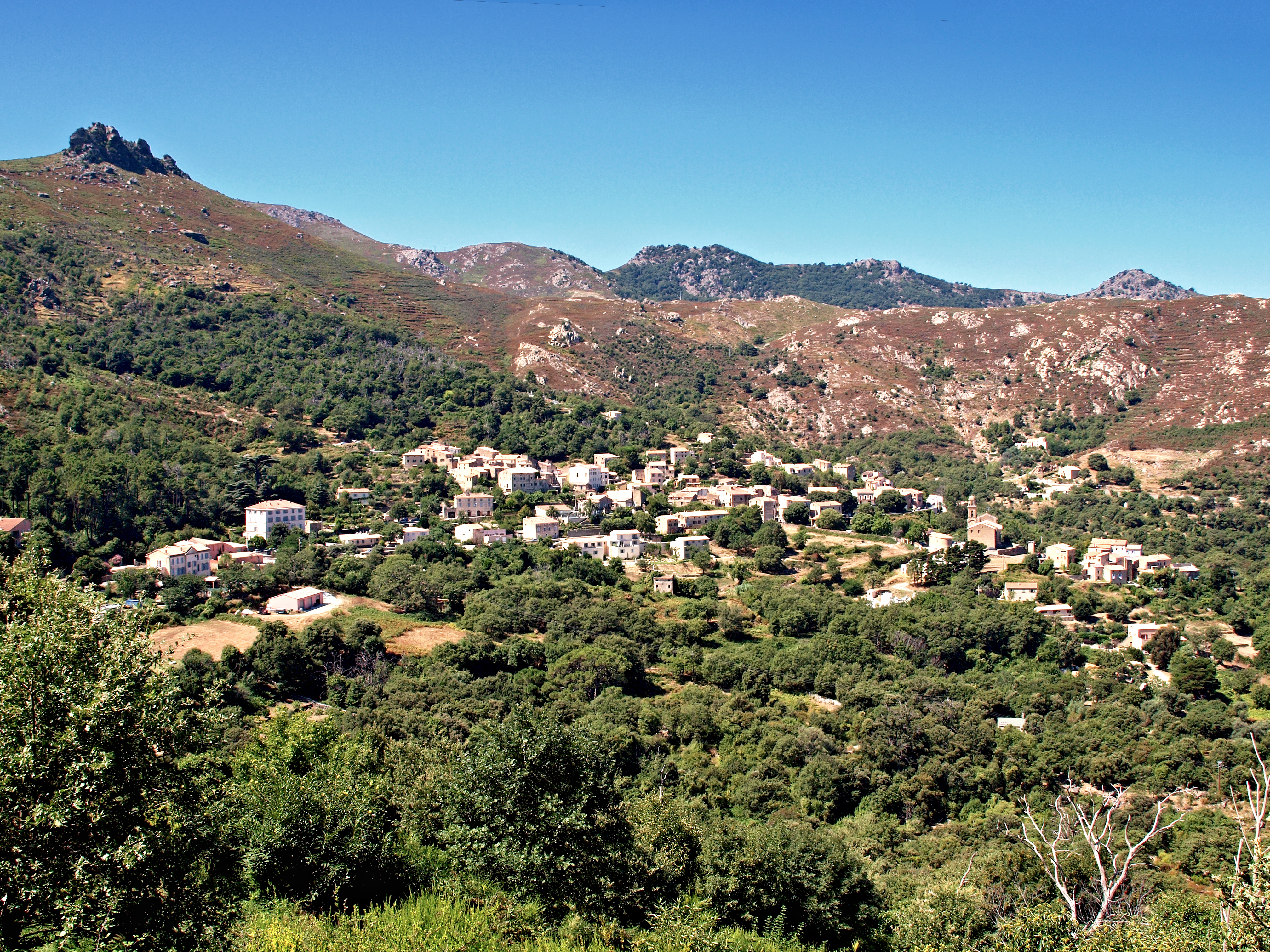 Feliceto (Corsica) - Vue du village